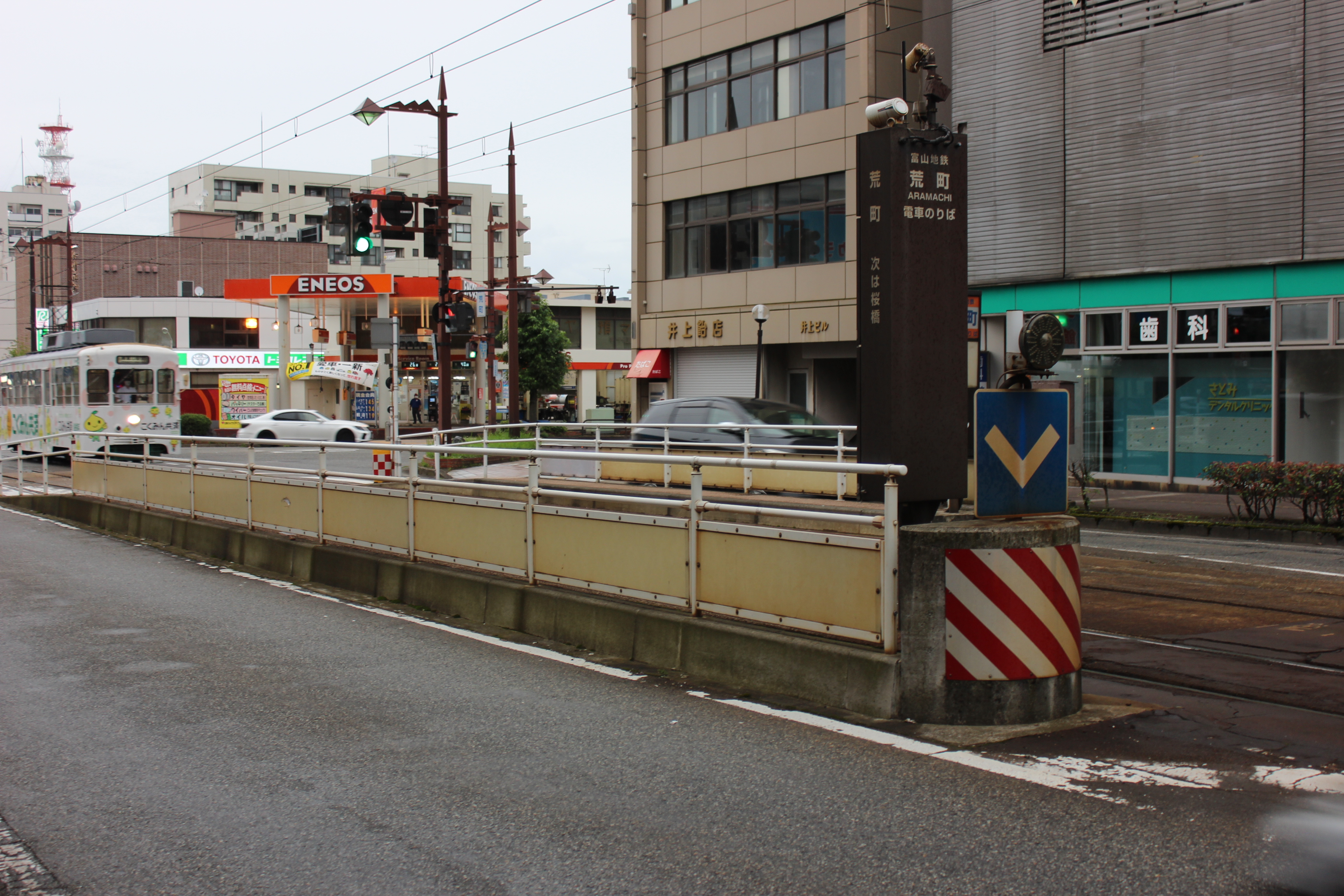 荒町停留場（富山県富山市）